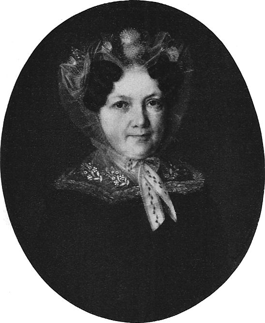 Luise Katharina Vellnagel geb. Sick [Gattin des Kaufmanns Johann Ferdinand Vellnagel]